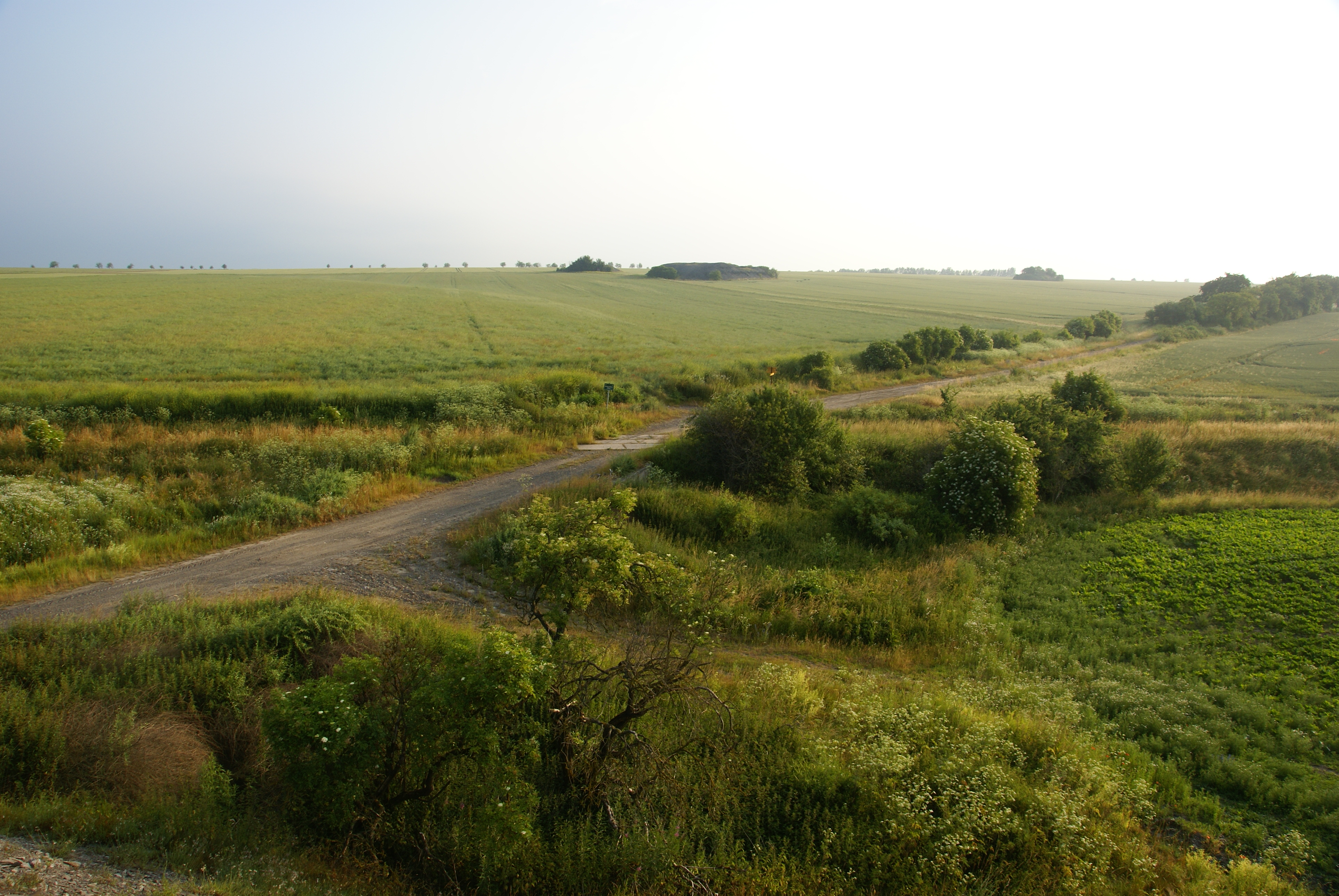 Blick auf den Ort, an dem Nisseldorf gestanden hat. Hier kreuzen die Gleise der Halle-Hettstedter Eisenbahn einen Feldweg